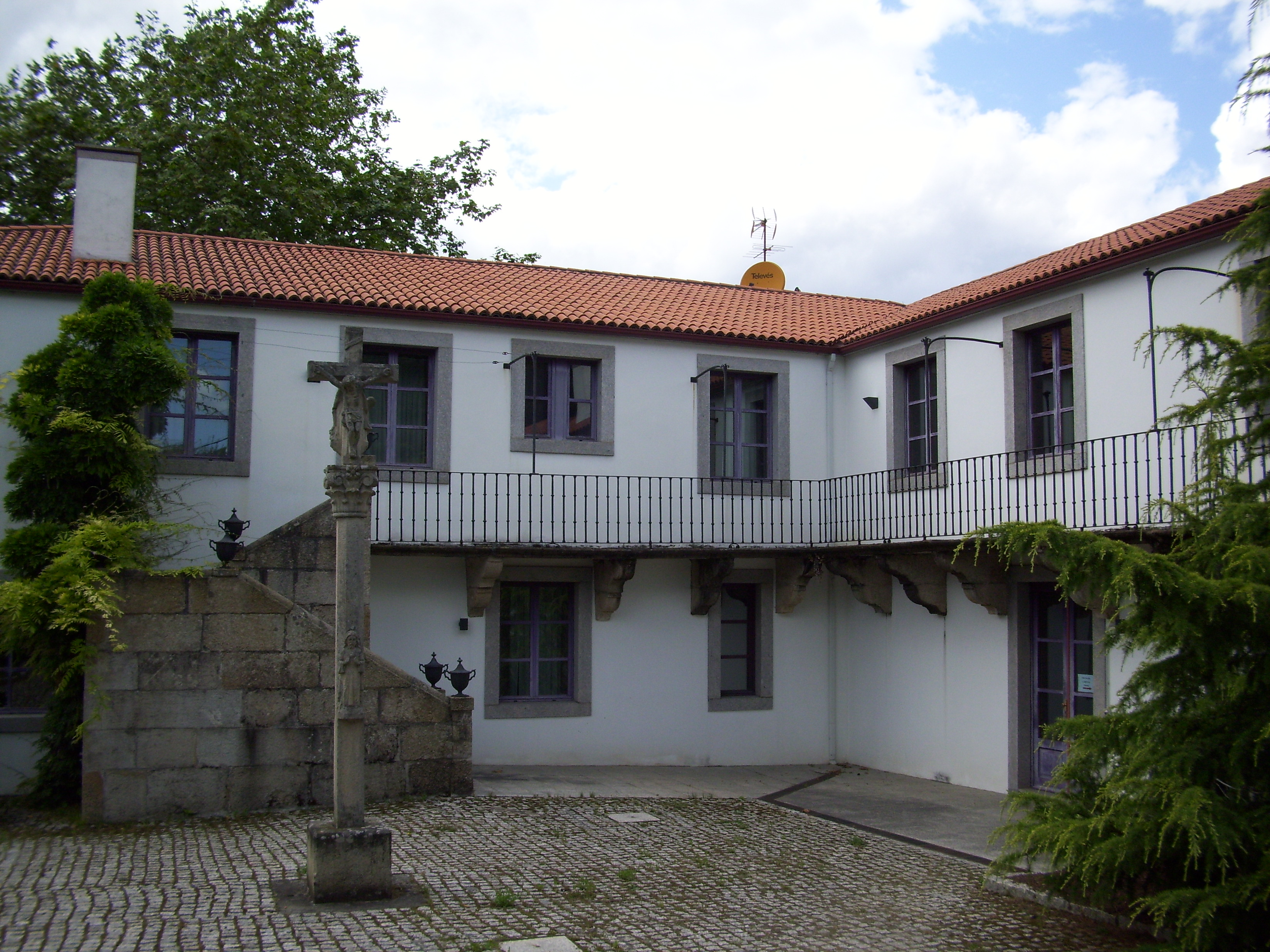 Patio e cruceiro do pazo de Lóngora (Santaia de Liáns, Oleiros), residencia do matrimonio composto polo músico e compositor Marcial del Adalid e a escritora Francisca González Garrido (que usou os pseudónimos Fanny Garrido e Eulalia de Liáns). Na actualidade, o pazo de Lóngora acolle o Instituto Universitario de Medio Ambiente da Universidade da Coruña.